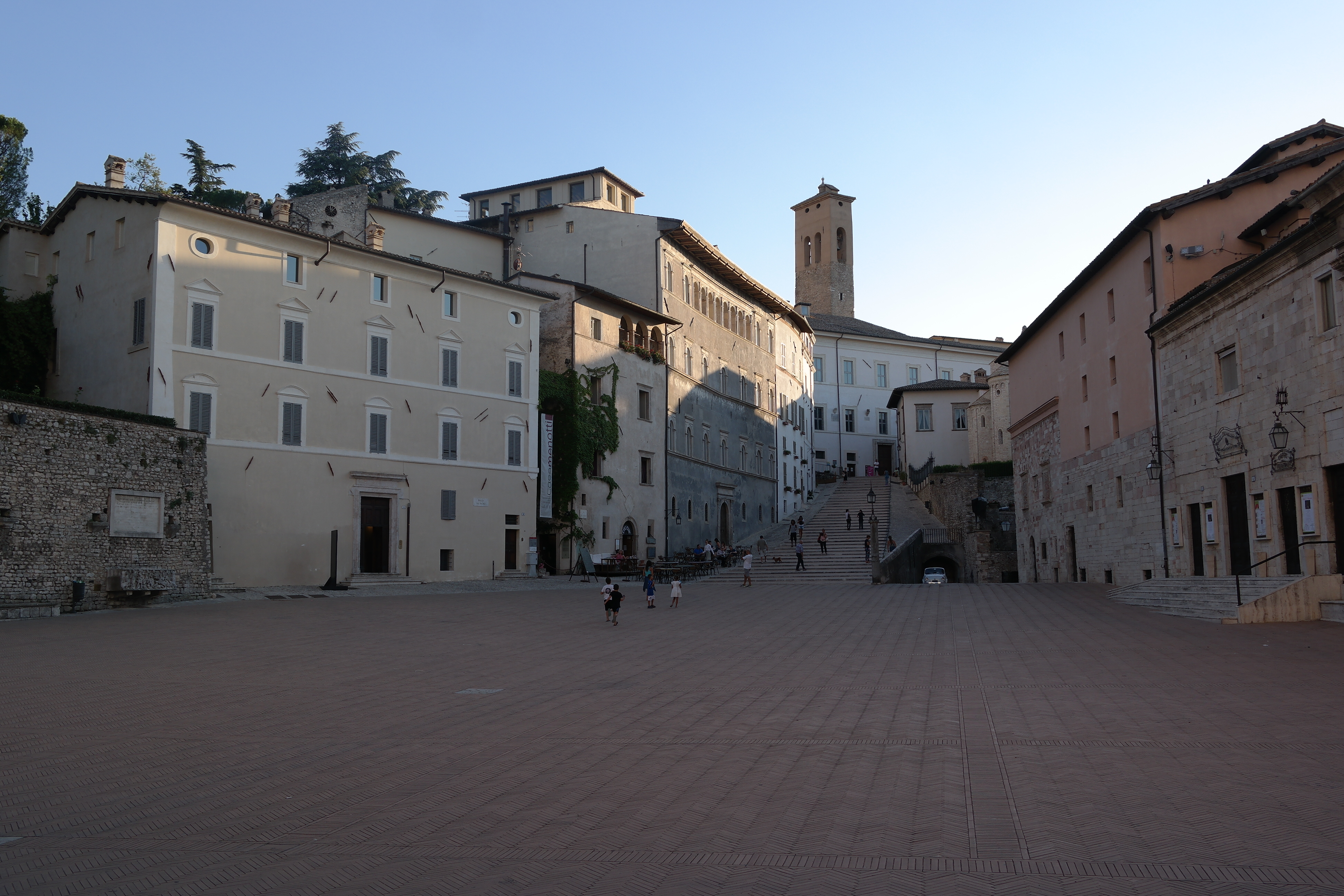 Piazza del Duomo a Spoleto